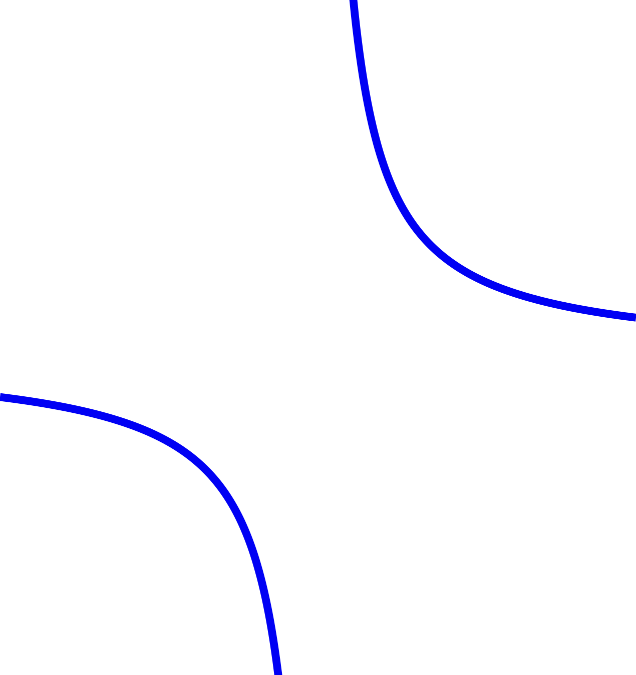 היפרבולה